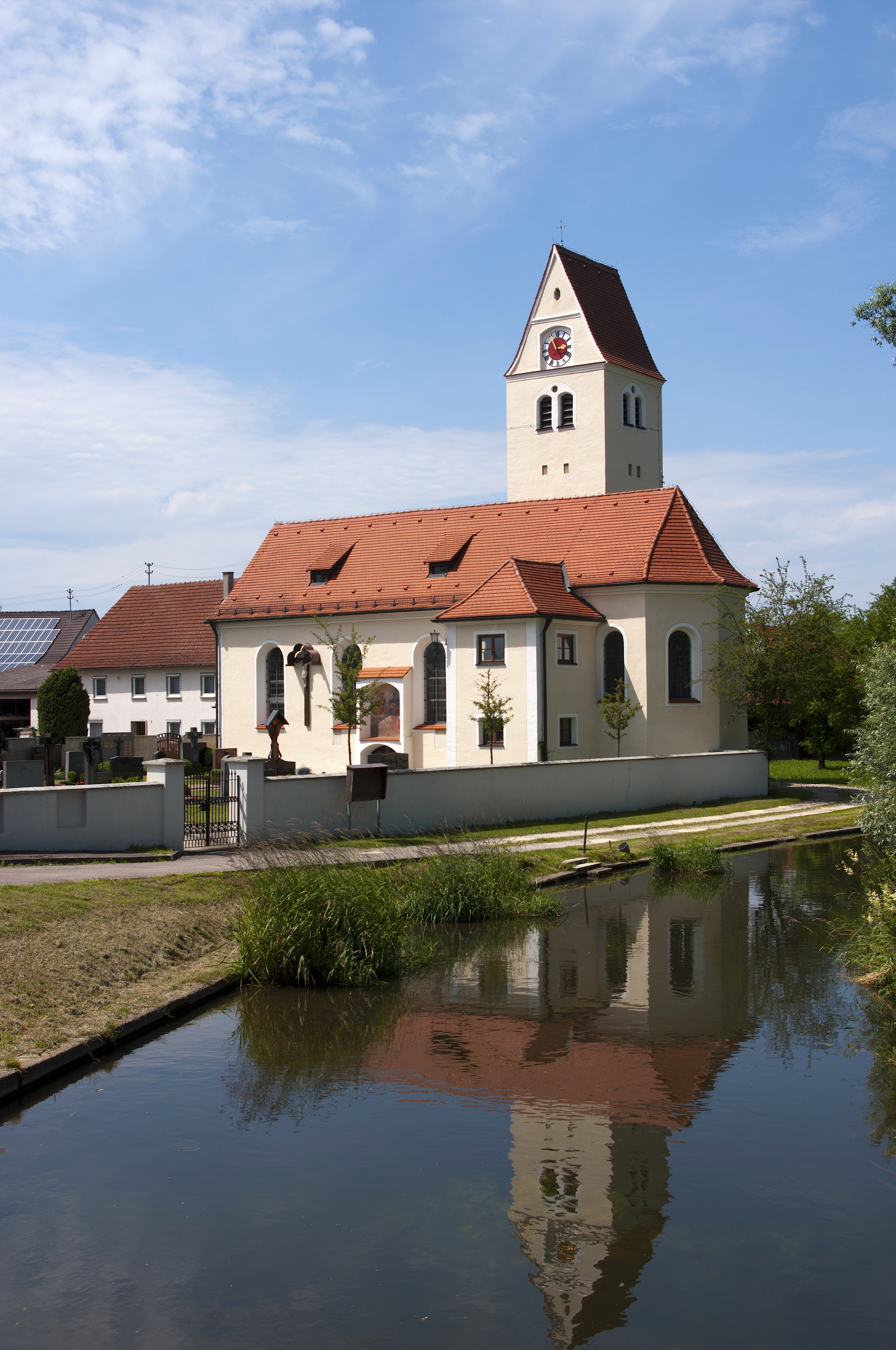 älteste Teile aus dem 14. Jahrhundert, Chor und Stützpfeiler 1470, Turm 1500, barockisiert Mitte 17. und Mitte 18. Jahrhundert, Friedhof 1787 angelegt.